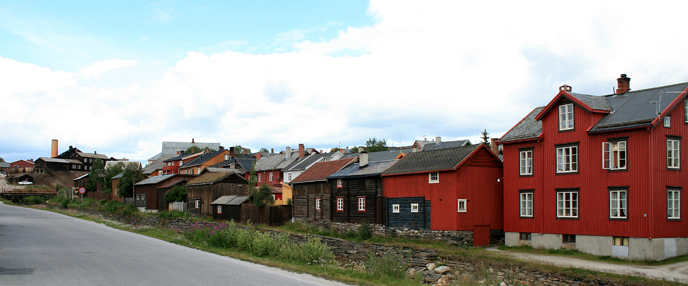 Bebyggelsen langs Smedveta på Røros, med Hitterelva i forgrunnen.